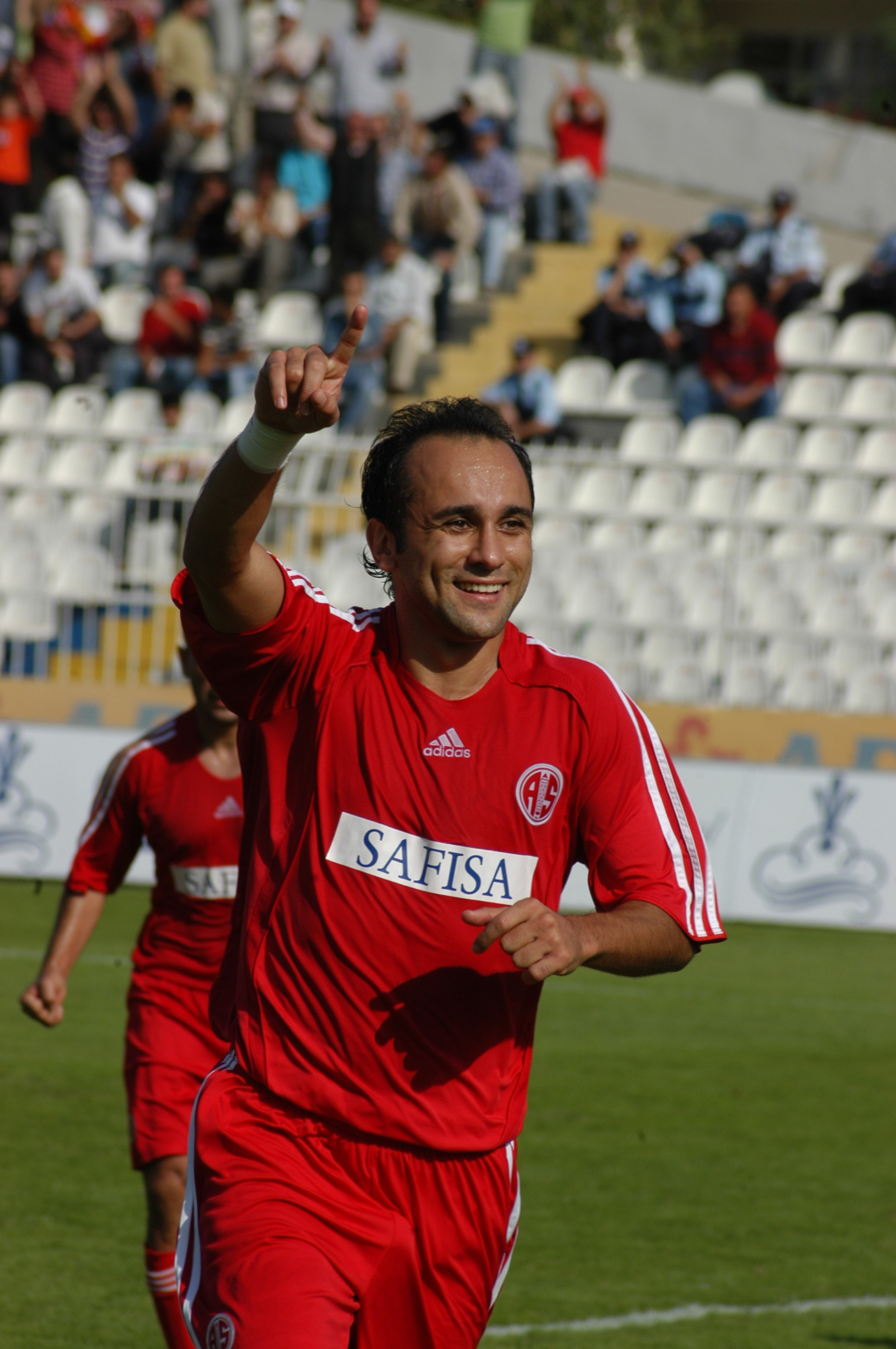 Cenk,Antalyaspor formasıyla